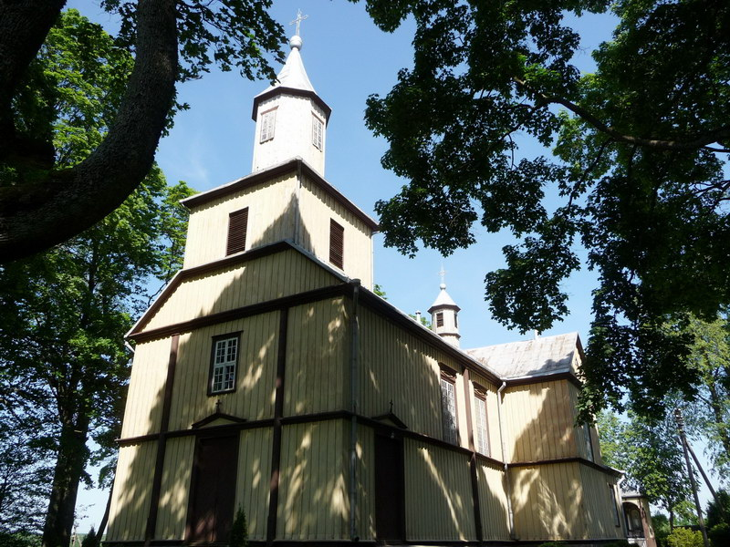 Plokščių Švč. Mergelės Marijos Vardo bažnyčia